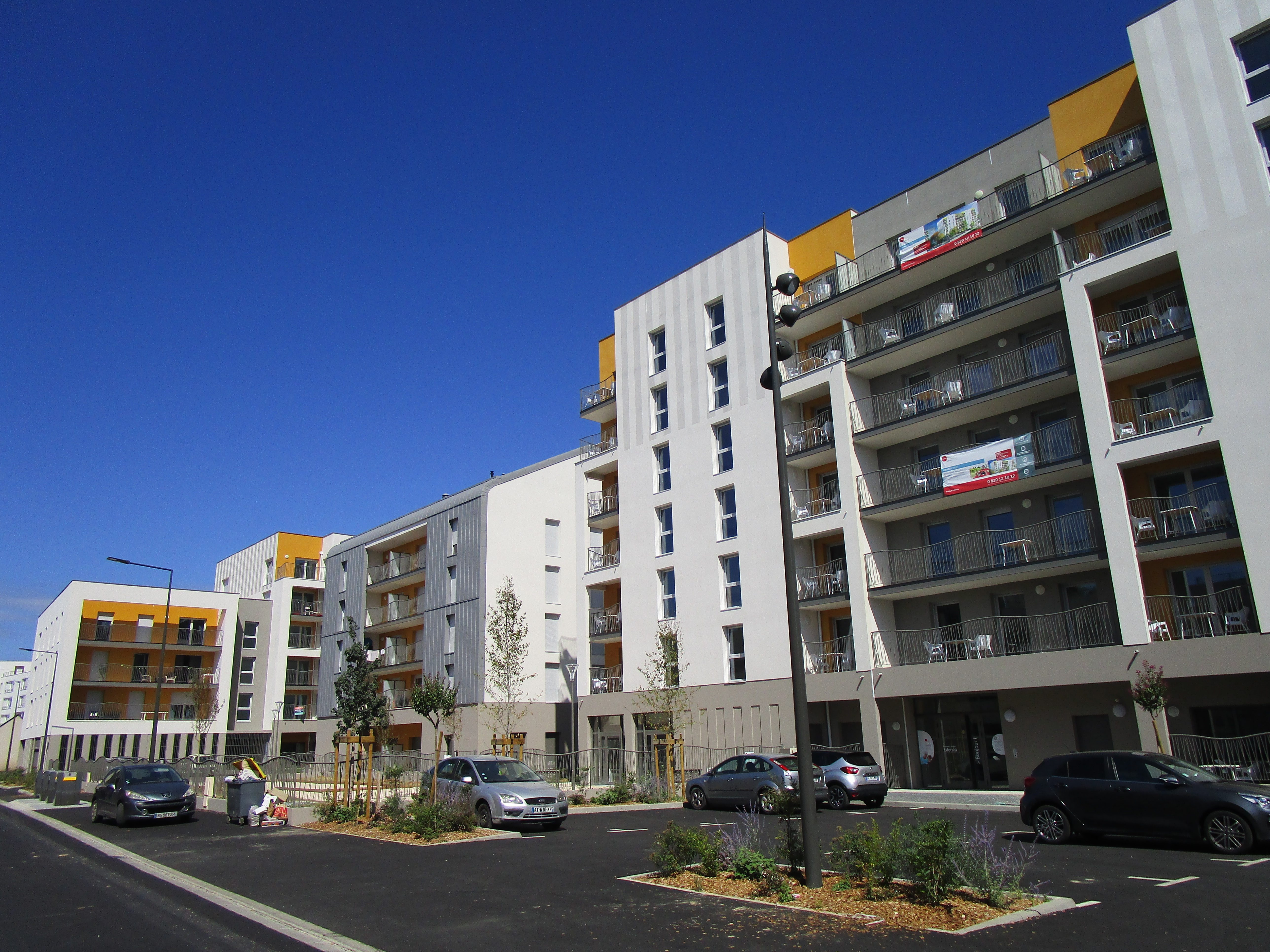 Trois immeubles de l'ancien programme Canopée, livrés en 2018 pour 113 logements. Au premier plan, la résidence Plénitude/Edena de 63 logements, au fond la résidence privée Opaline de 31 logements, et entre les deux la résidence sociale de La Tourangelle d'HLM pour 19 appartements.